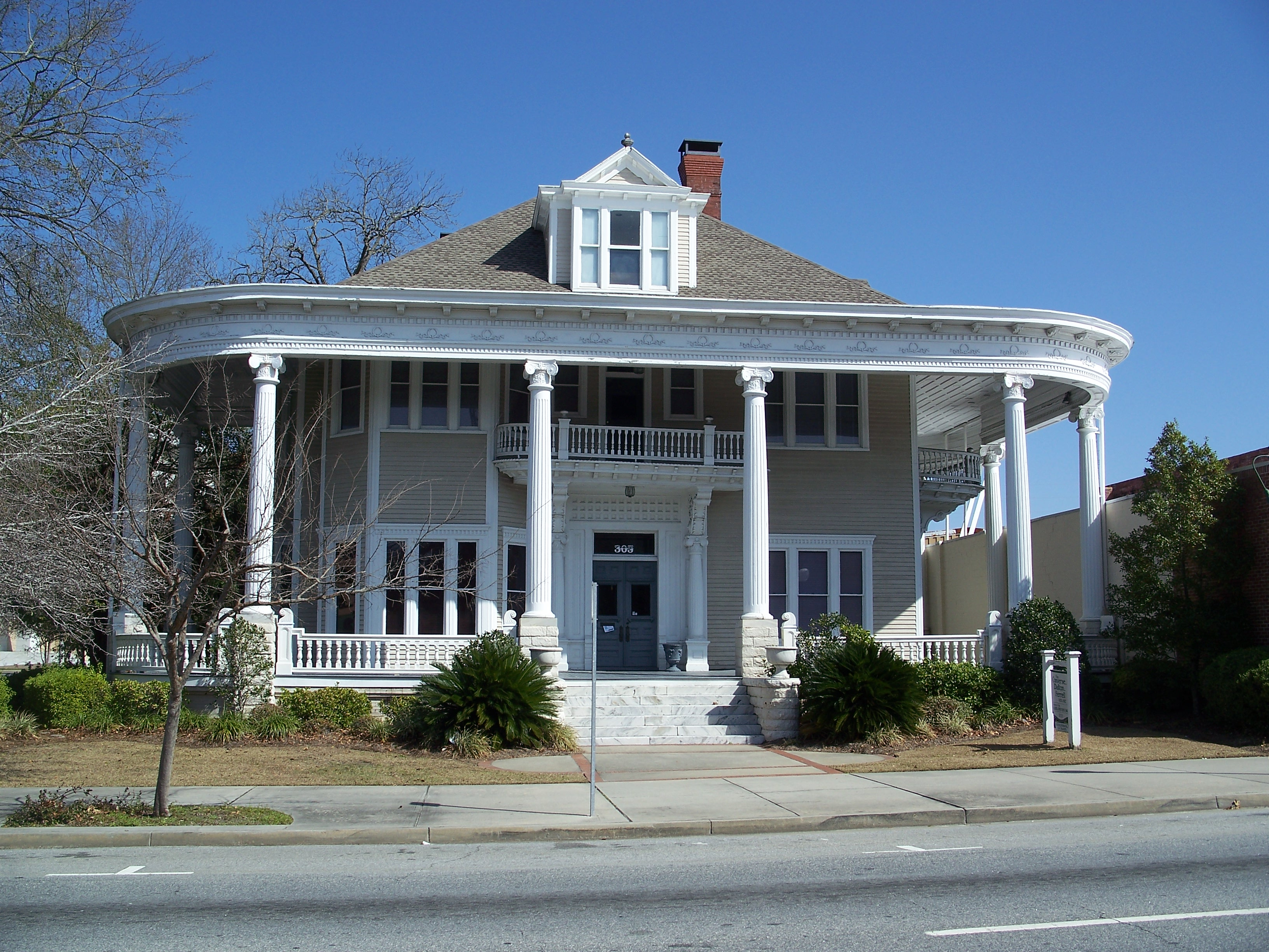 Valdosta, Georgia: Converse-Dalton House.